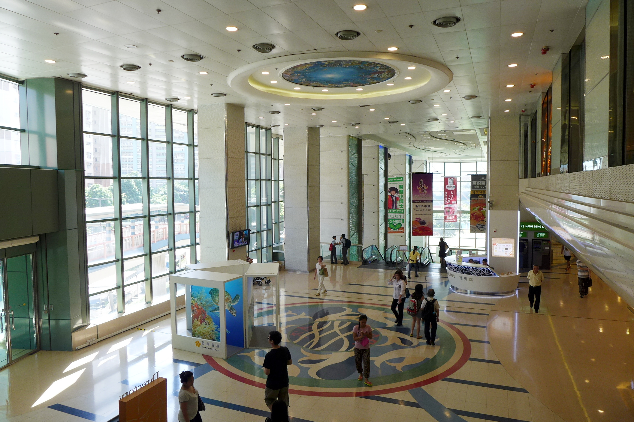 Island Resort Mall Void view